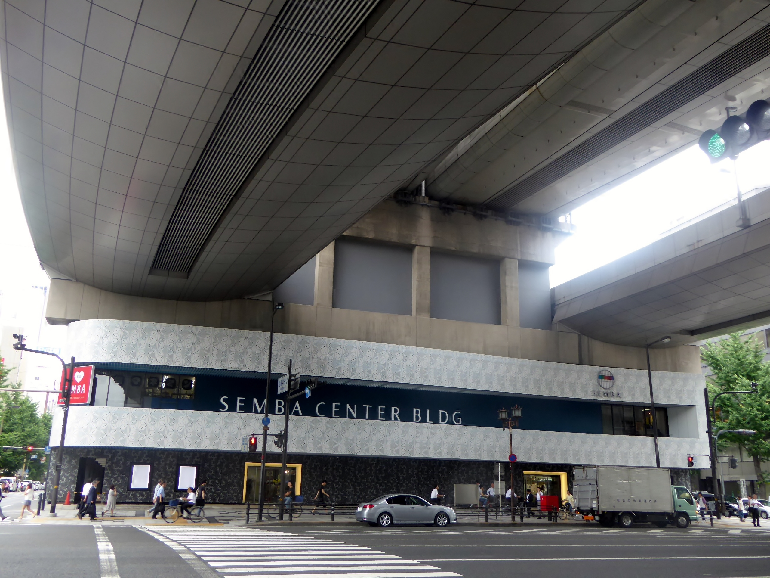 2015年7月16日時点の船場センタービルディング9番館を撮影。